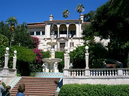 Haupthaus von Hearst Castle